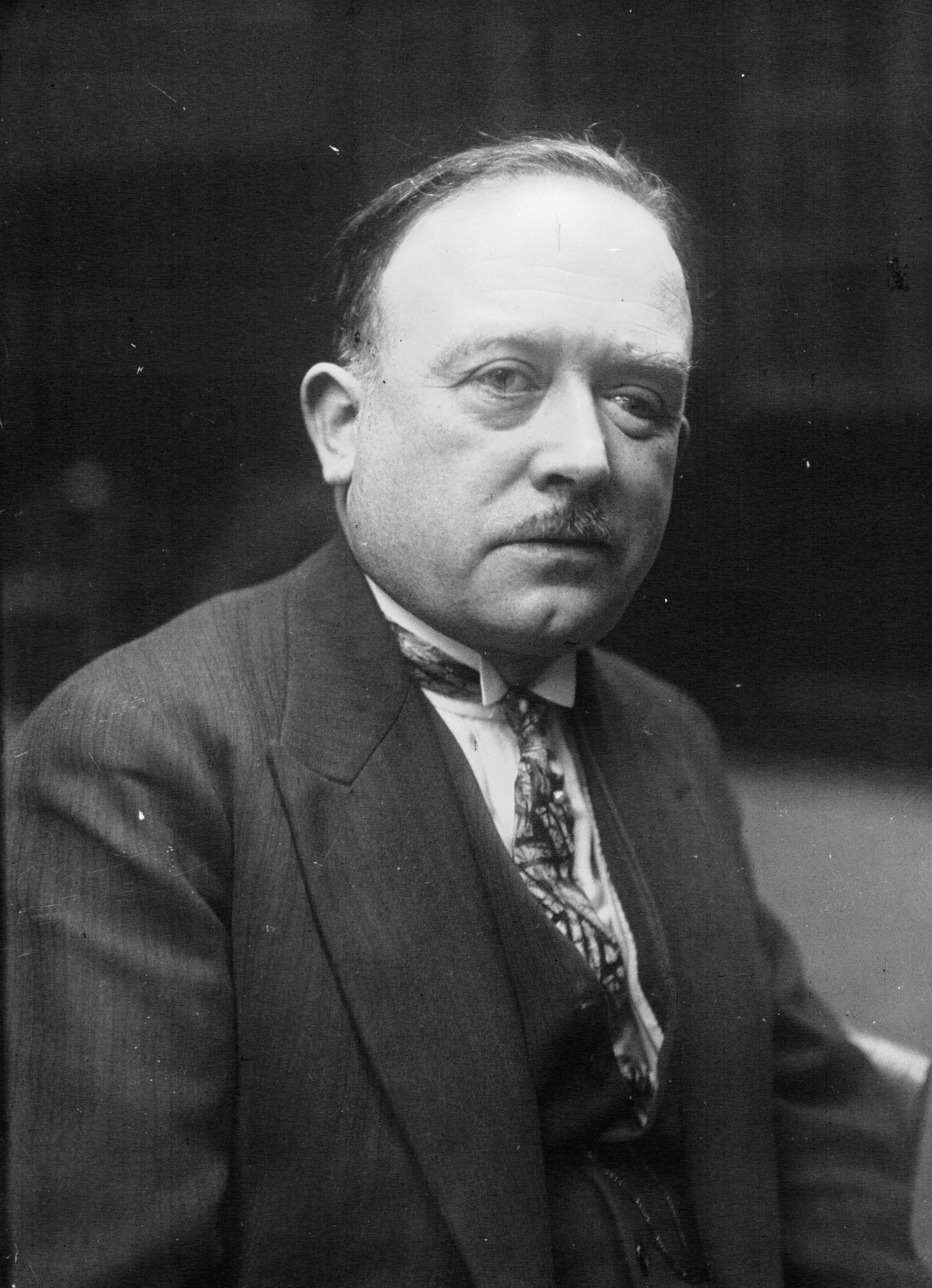 Vincent Auriol, député (portrait) : photographie de presse